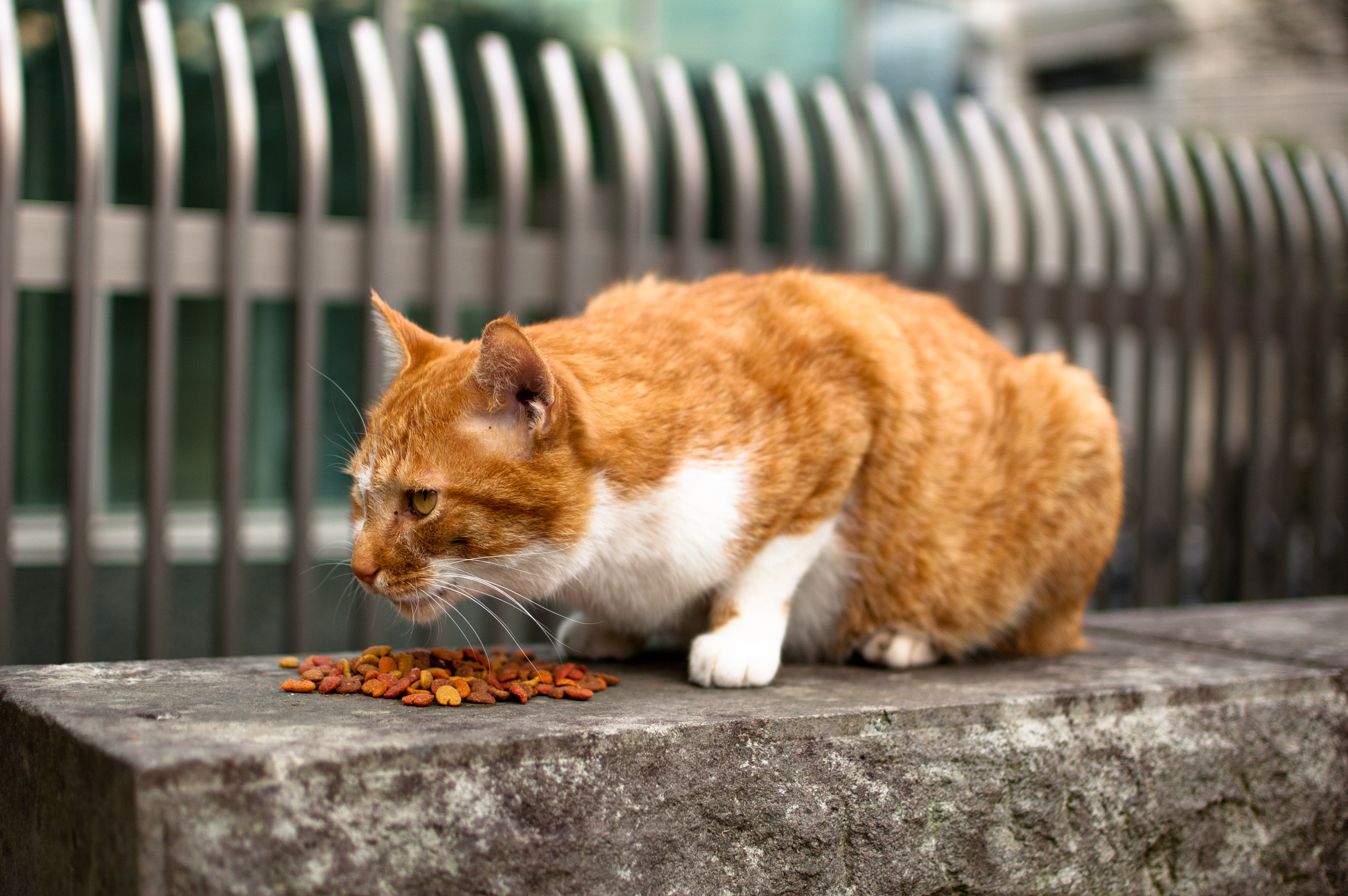 Ikegami